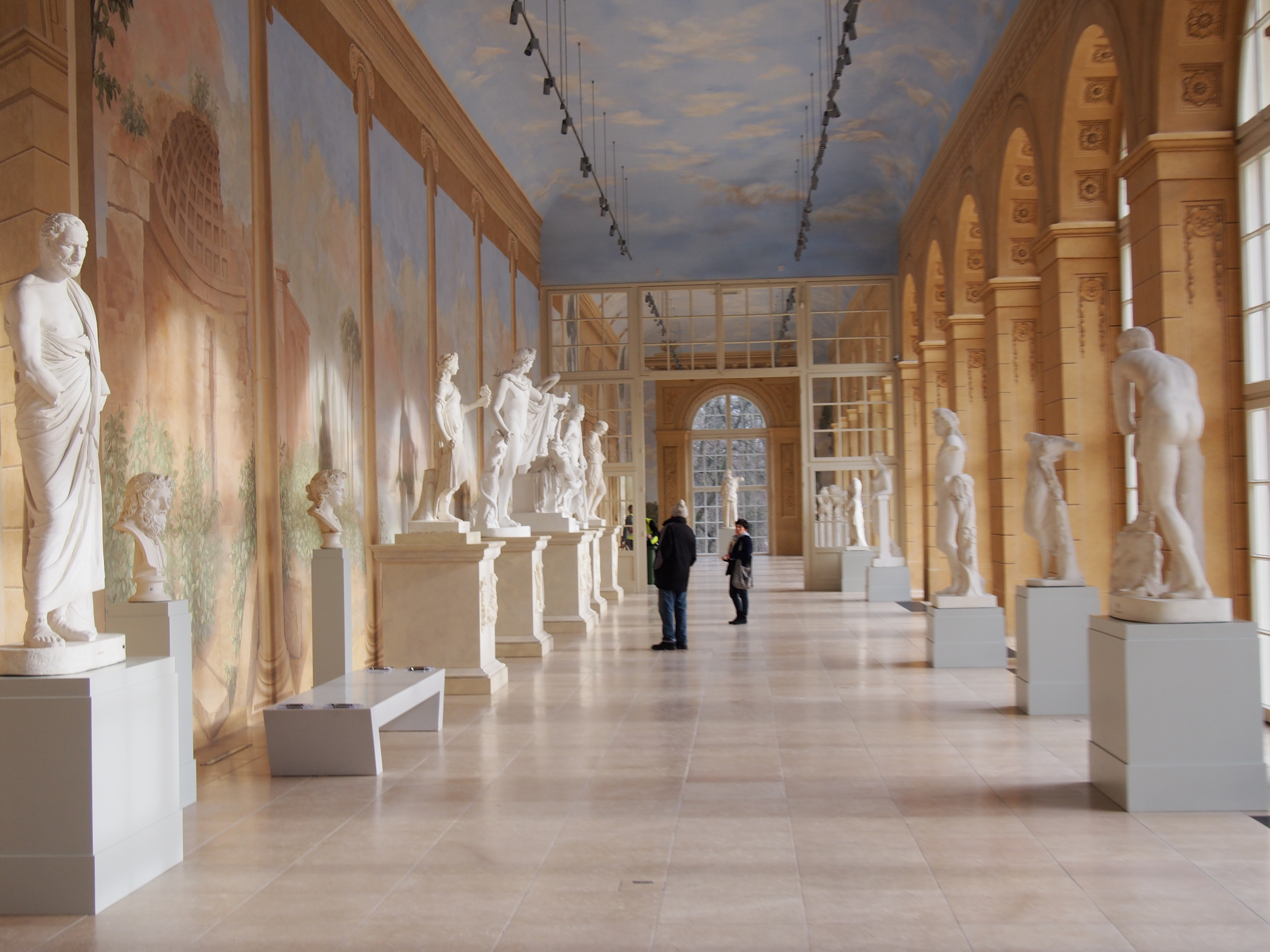 Stara Pomarańczarnia.